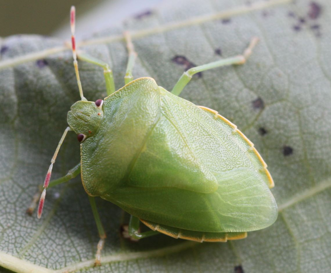 Wanze Nezara viridula am 23.9.2016 in der Schwetzinger Hardt